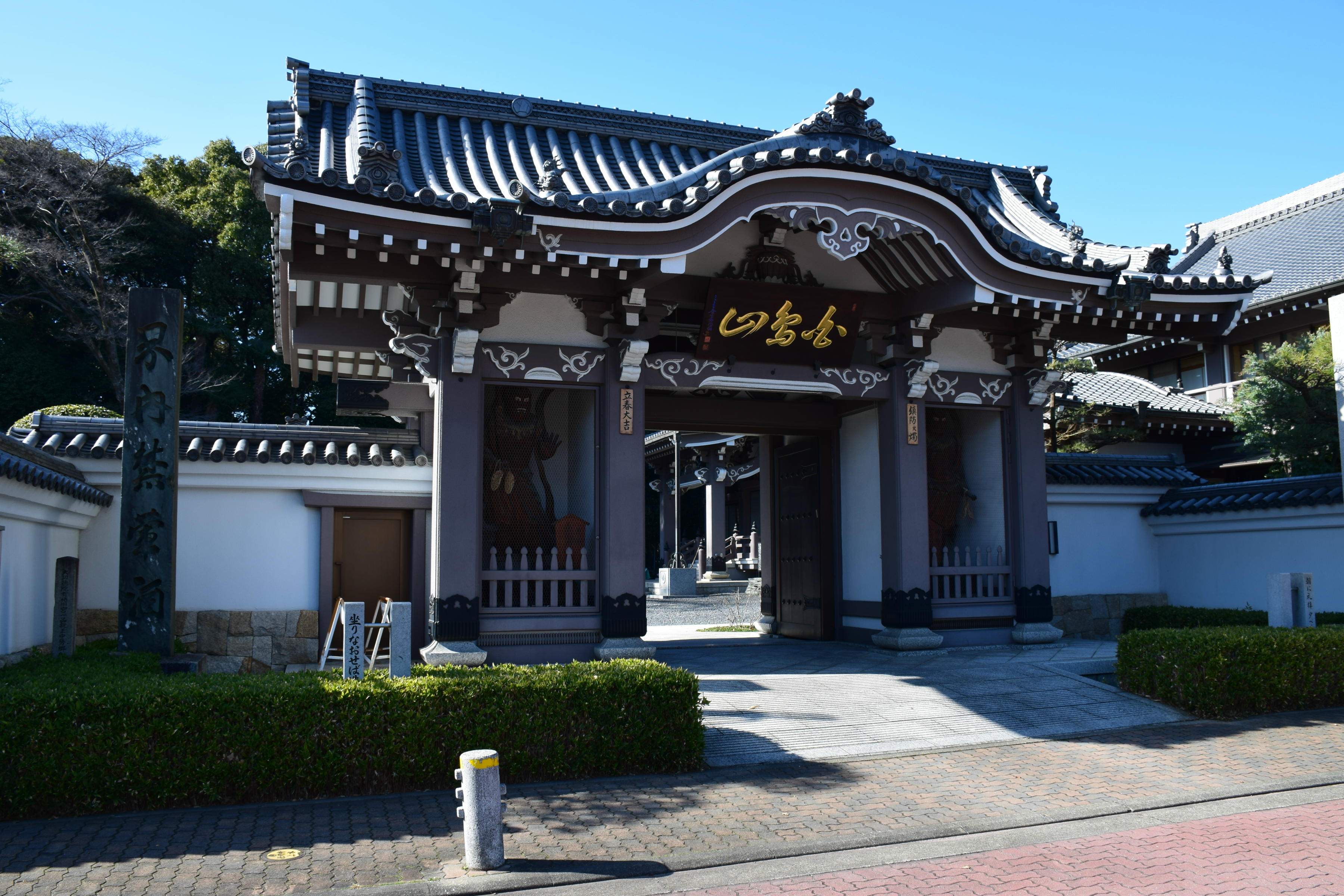 法持寺山門